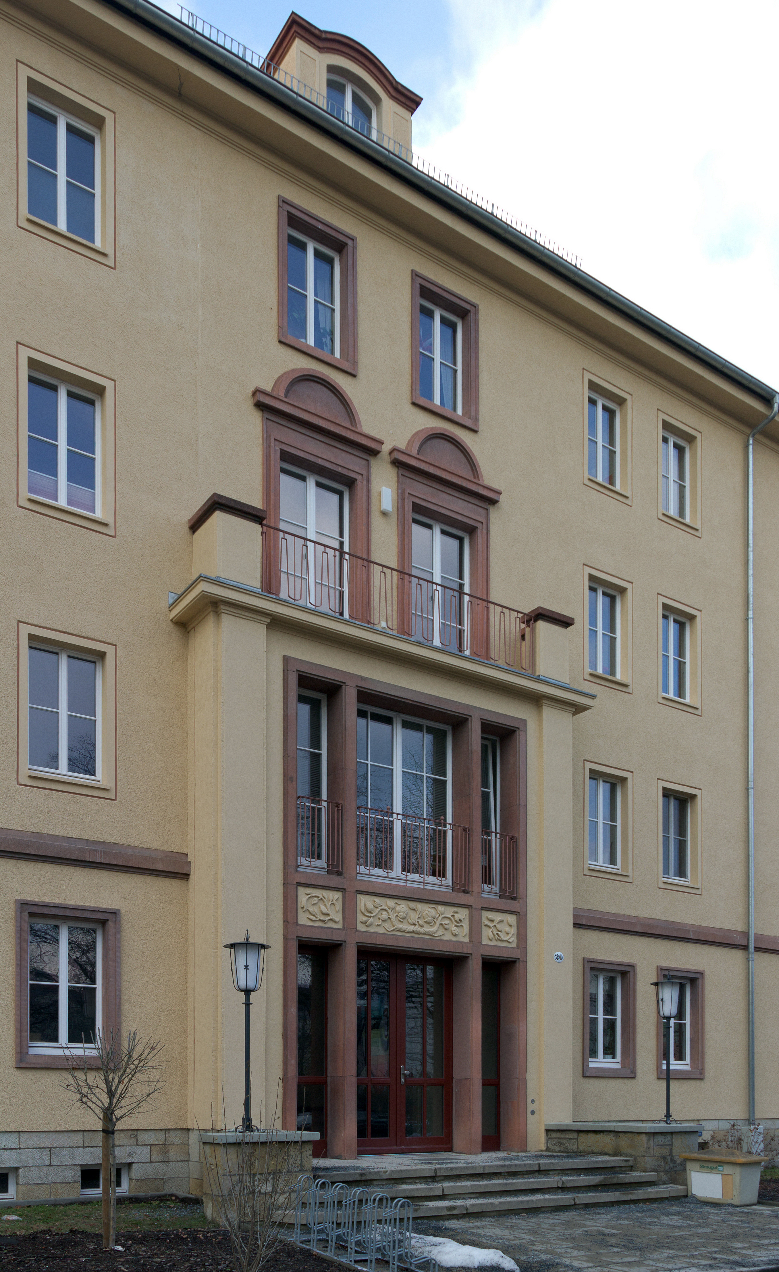 Schwesternwohnheim Tittmannstraße Dresden, Eingang